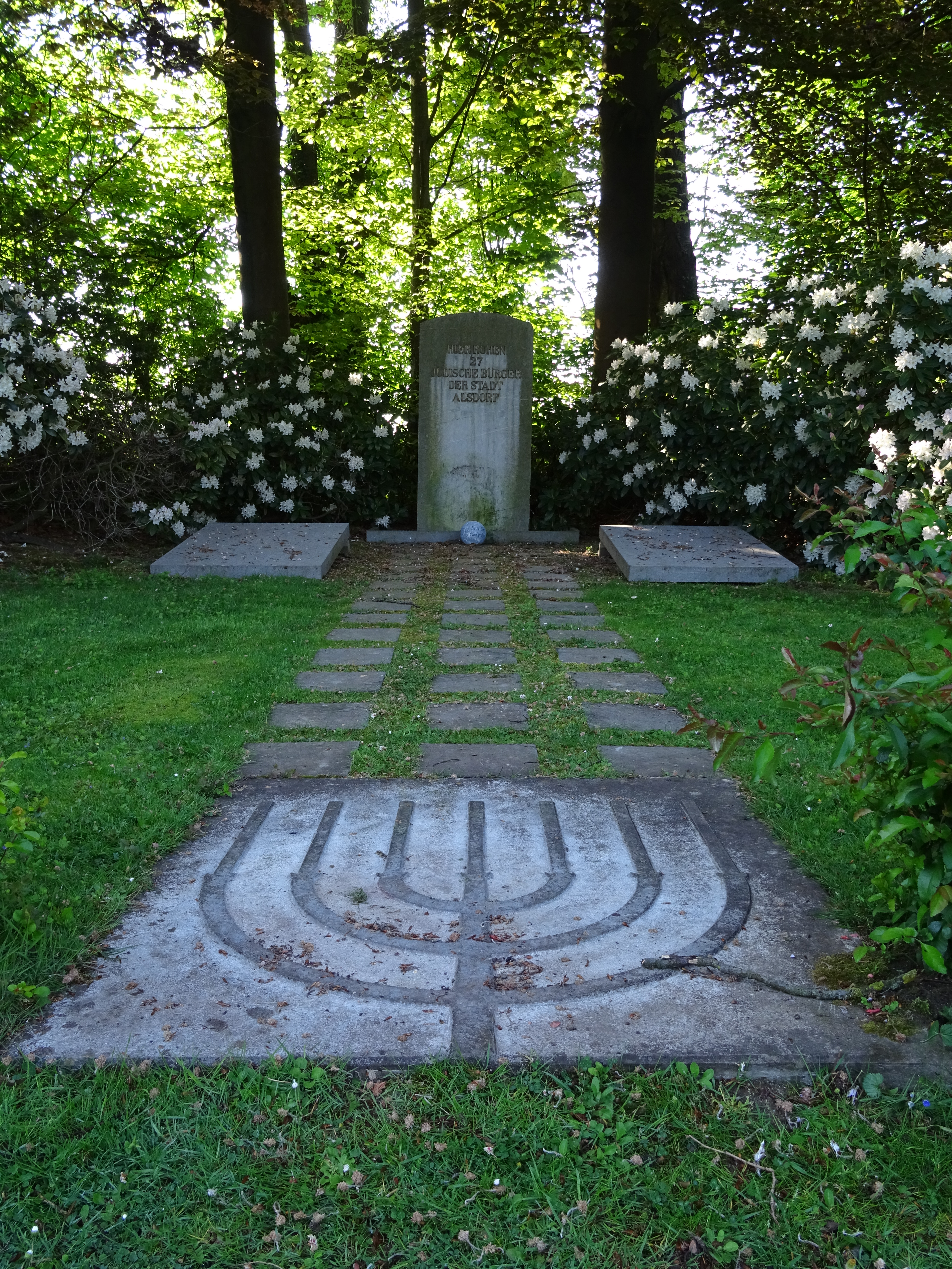 Baudenkmal Jüdischer Friedhof Alsdorf Nordfriedhof